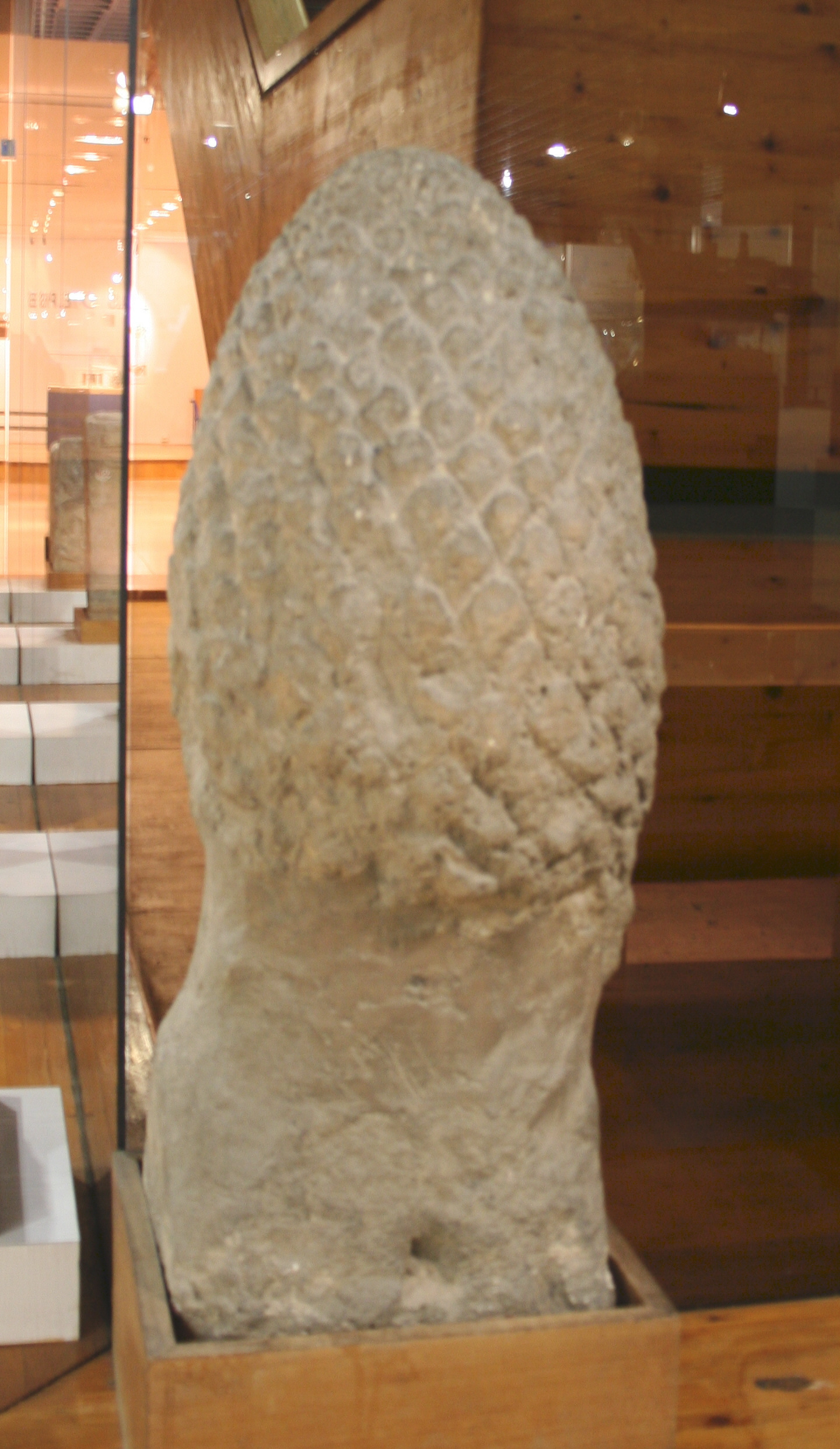 Pomme de pin en pierre trouvée à la nécropole de la rue de la République à Marseille. La pomme de pin était un symbole funéraire. Hauteur 0.33 mètre, diamètre 0.47 mètre.